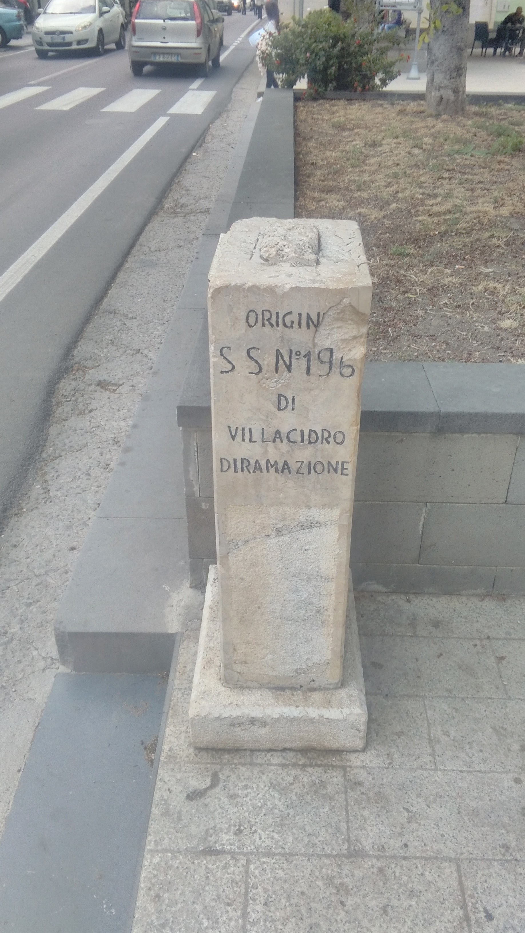 La pietra miliare posta all'origine della SS196dir, a Villasor